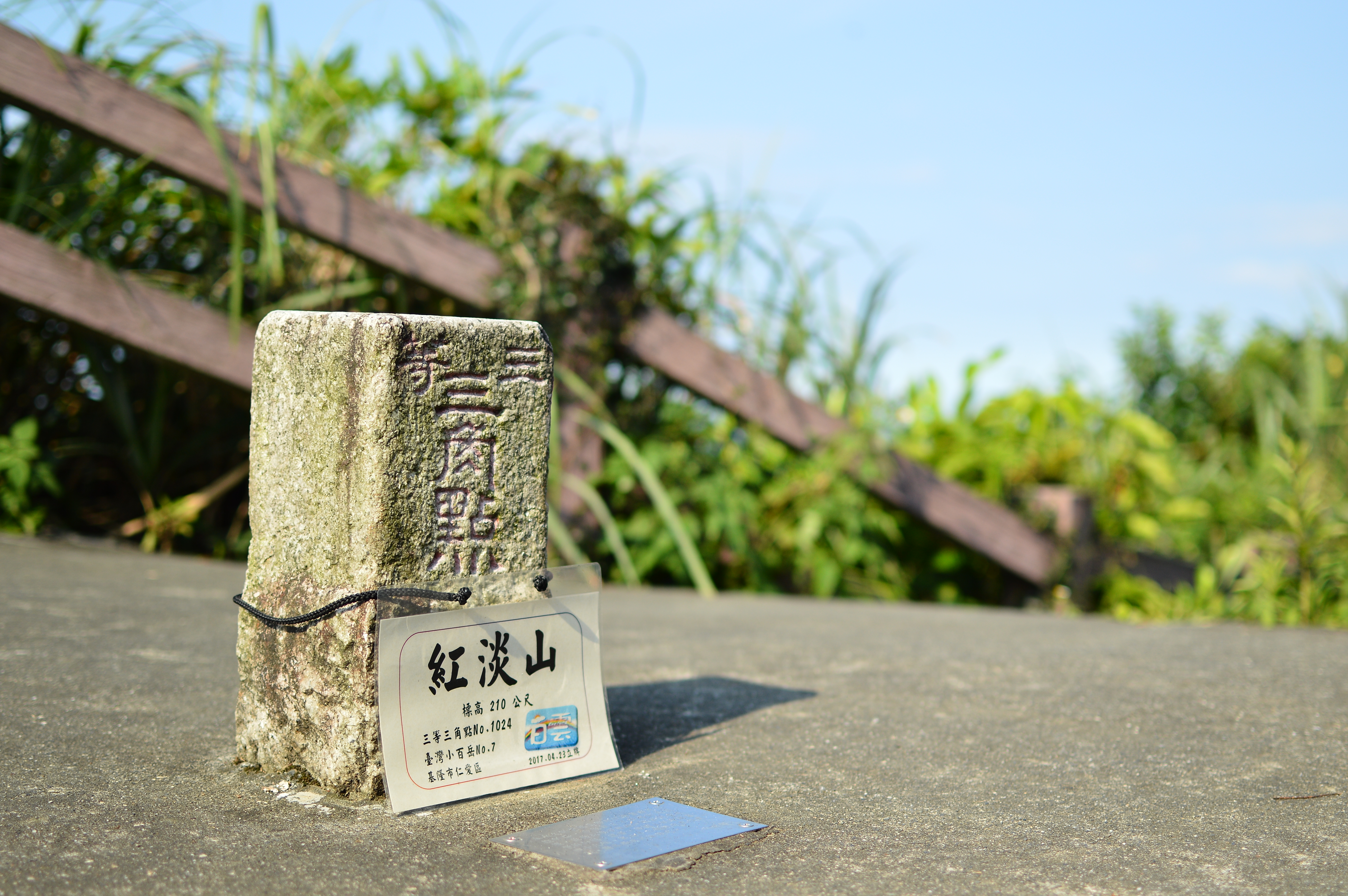 中文（台灣）: 基隆市紅淡山2017TAIWAN